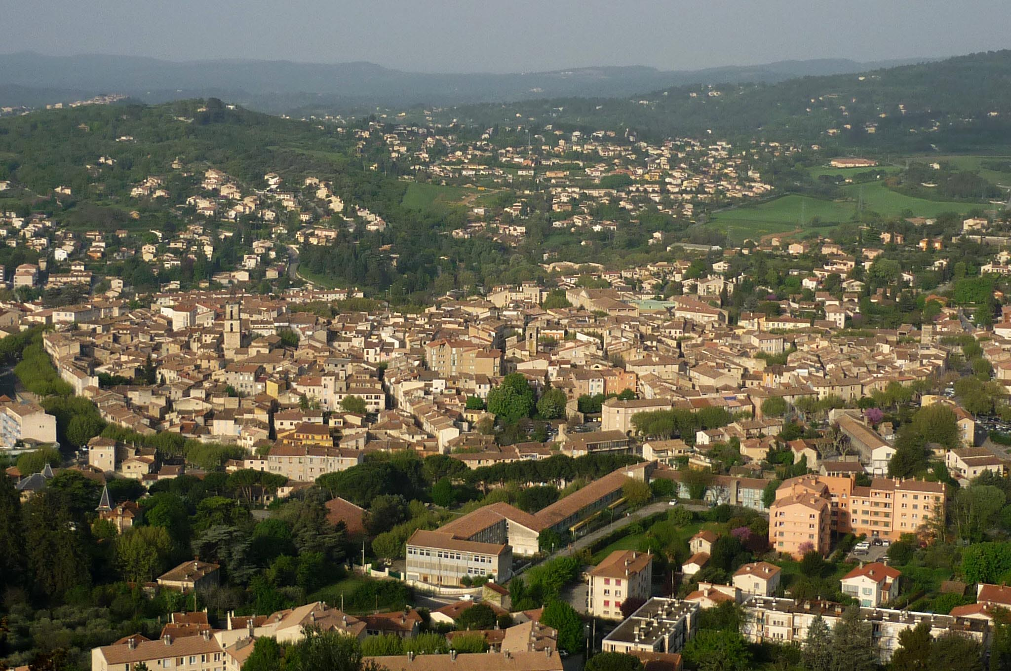 Blick vom Mont d´Or auf Manosque (Provence-Alpes-Côte d'Azur)